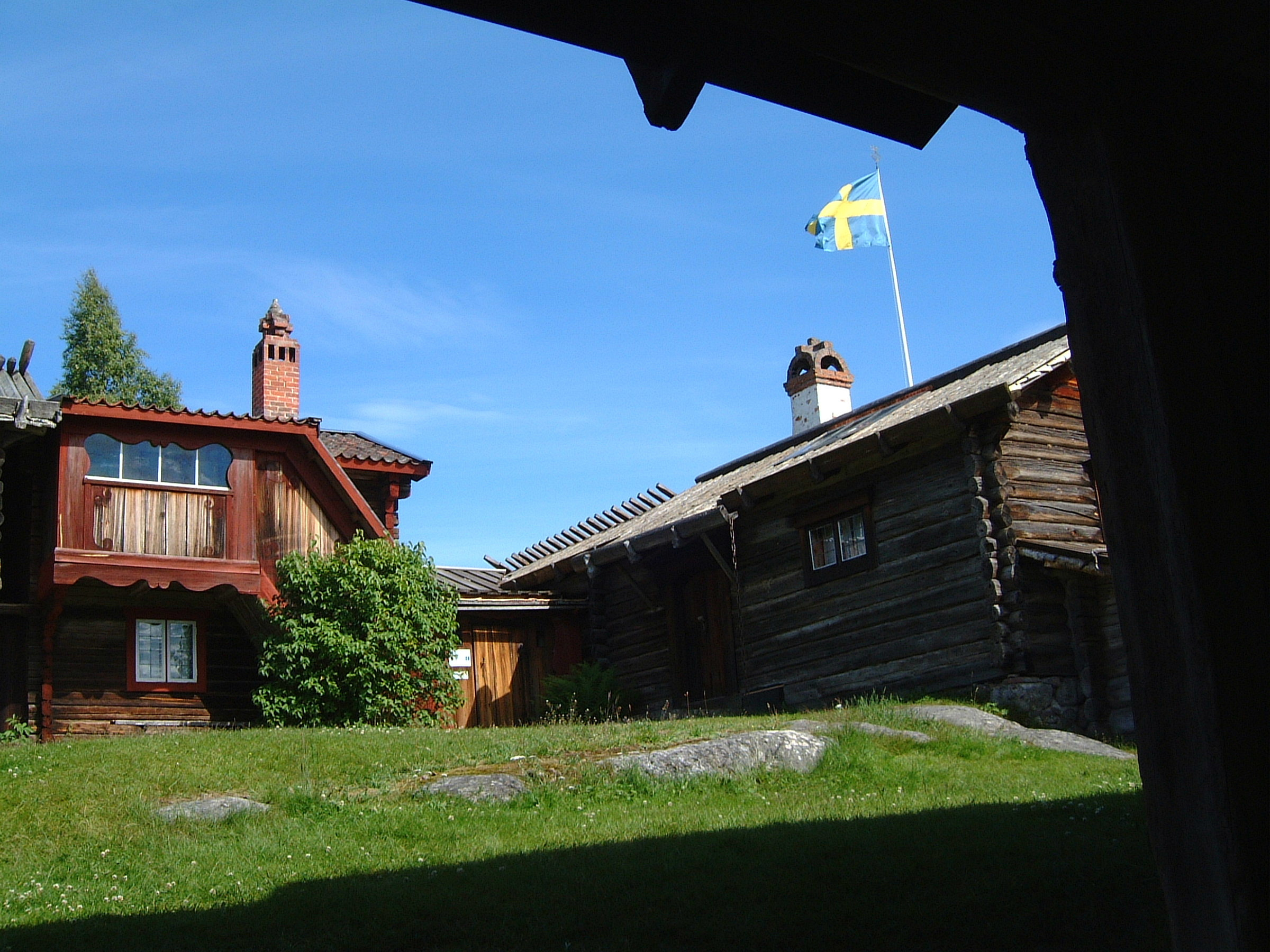 Högst upp i Tällberg ligger Holens Gammelgård och kaffestuga